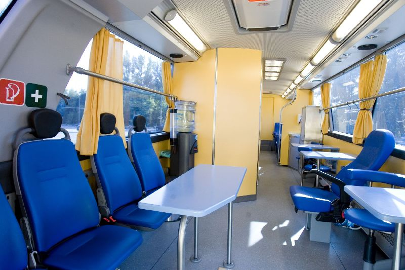 Ambulans